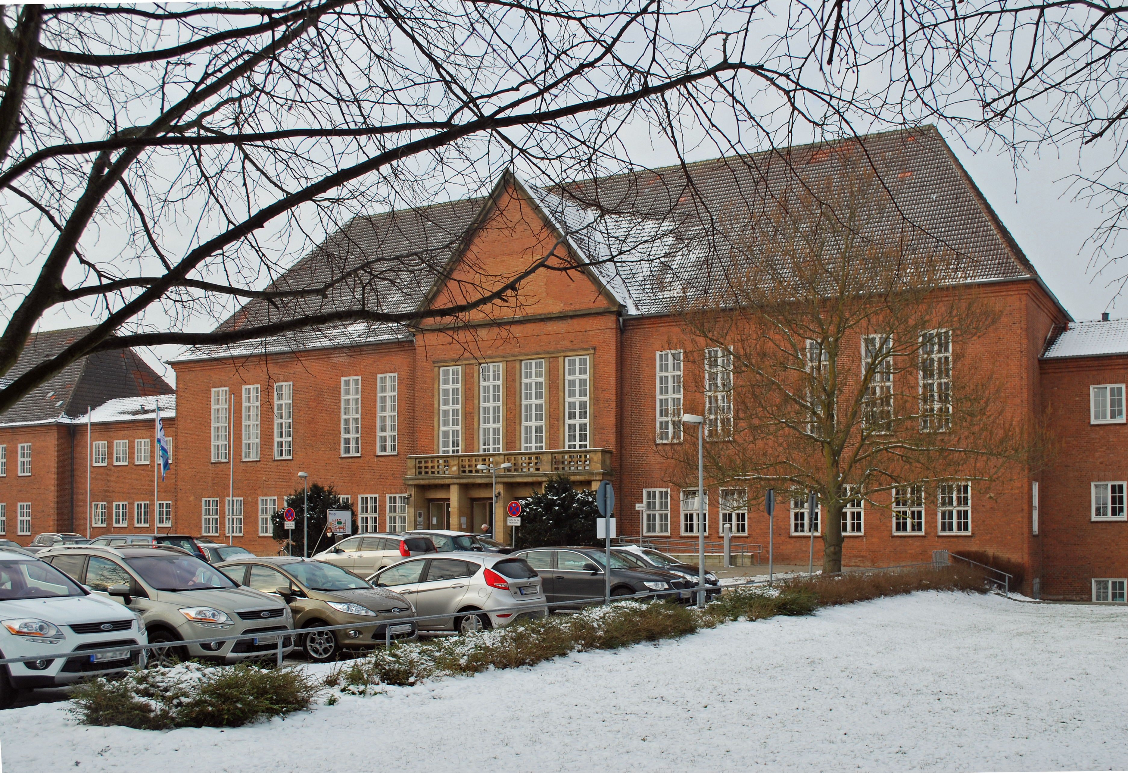 Das Hauptgebäude der Fachhochschule für Öffentliche Verwaltung, Polizei und Rechtspflege (FHÖVPR), Güstrow